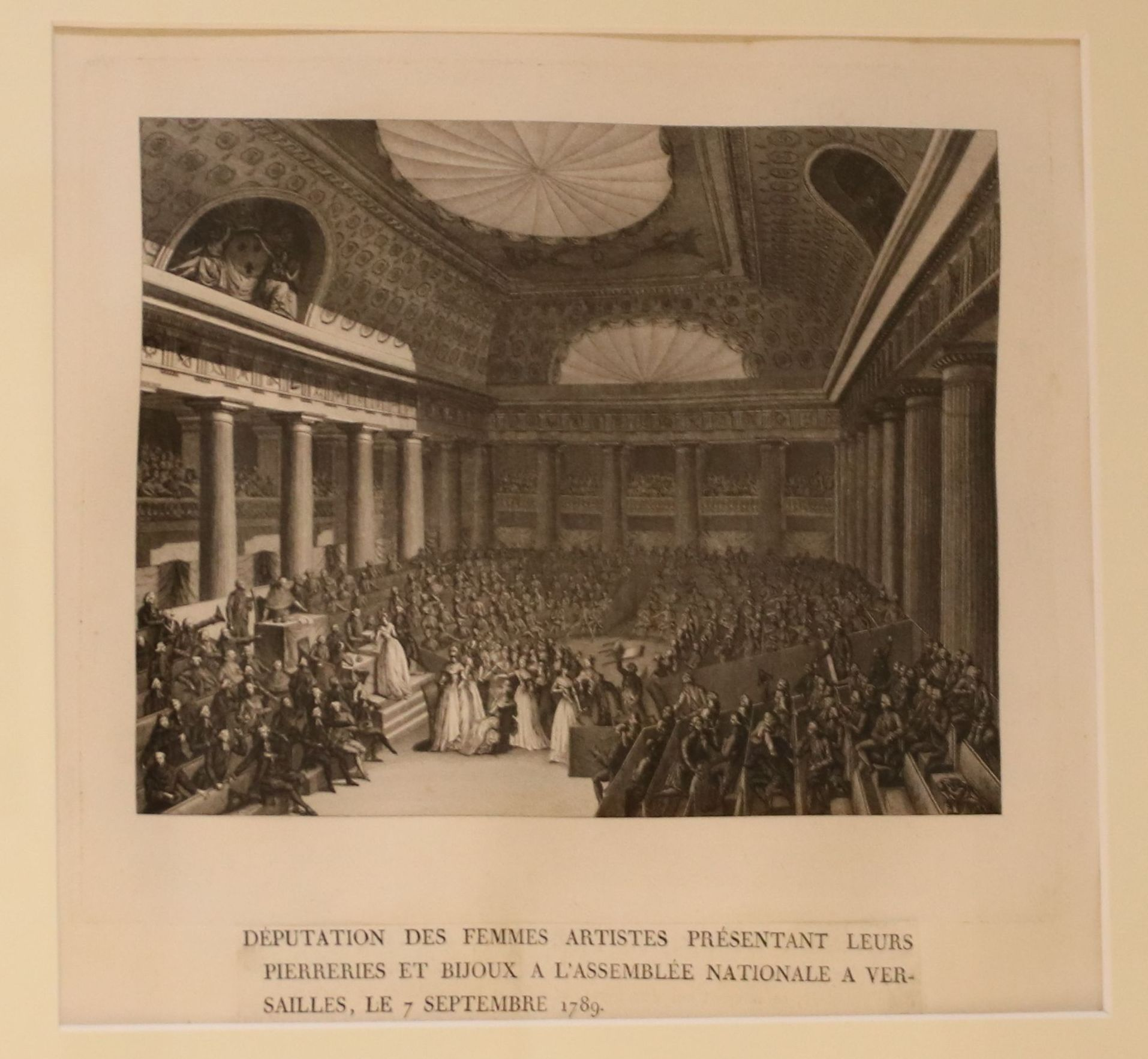 Jean-Louis Prieur - Députation des femmes artistes - estampe. Exposition Amazone de la révolution : Des femmes dans la tourmente- Musée Lambinet - Versailles - 2017.